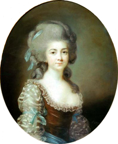 Portrait d'Antoinette Saint-Huberty (1756-1812), actrice française.